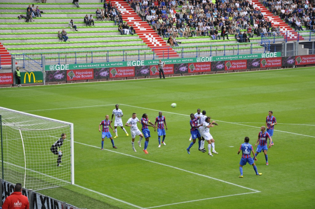 Matche entre Caen et Auxerre le 4 août 2012